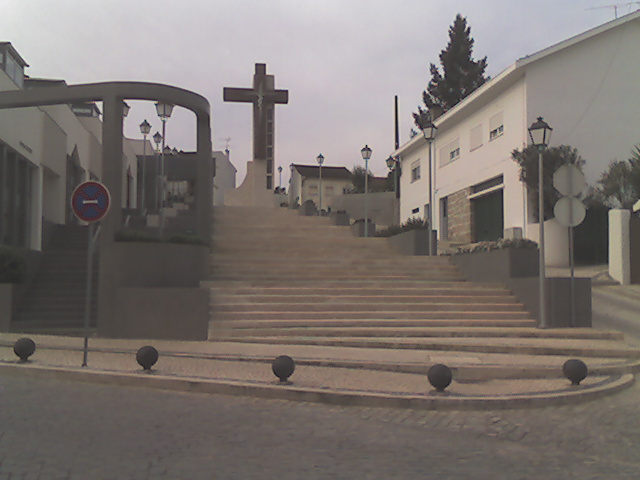 poiares